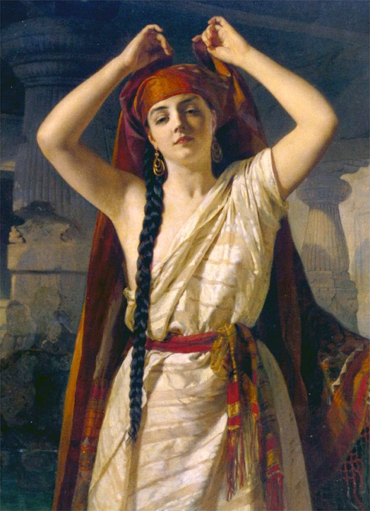 Egyptienne